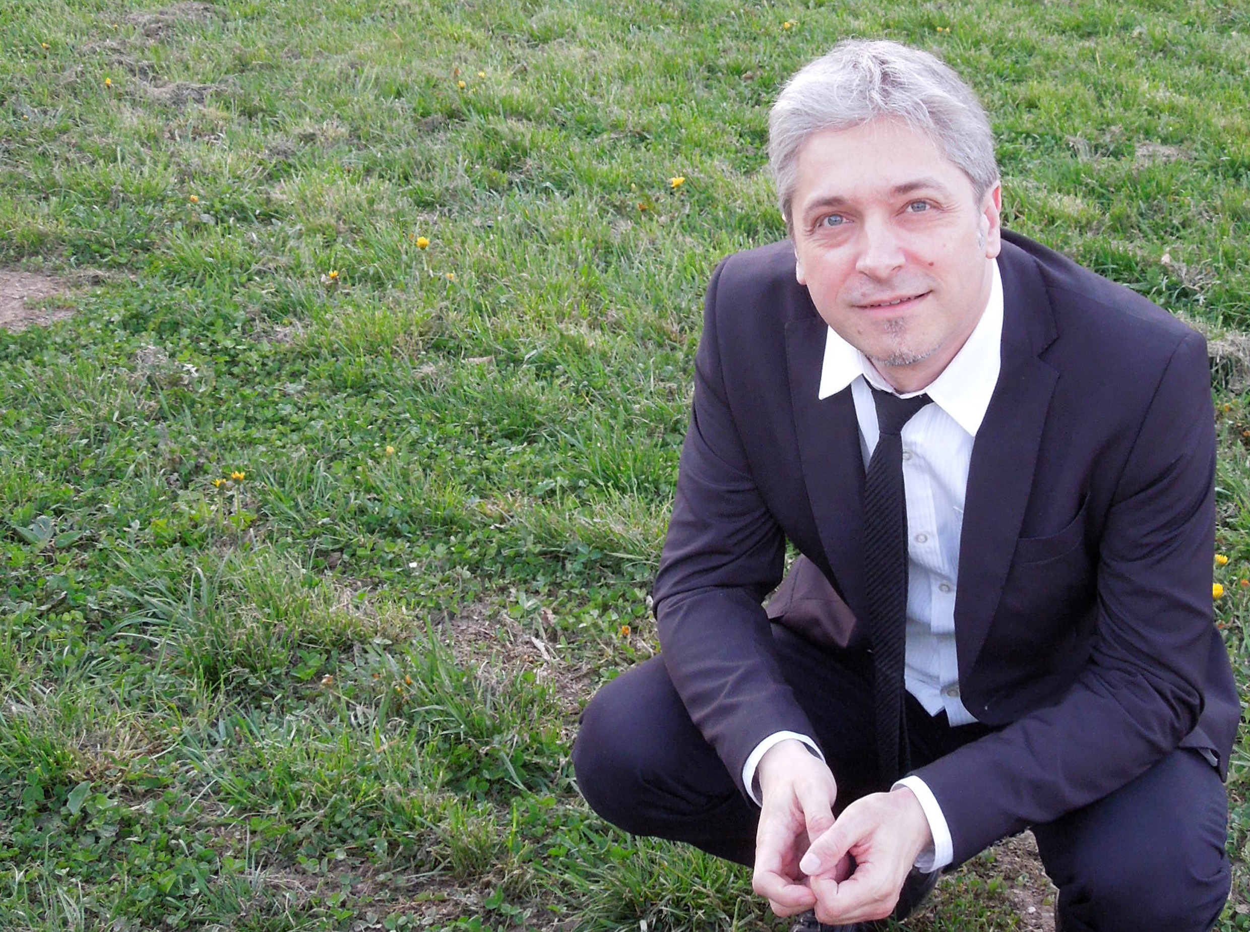 official foto